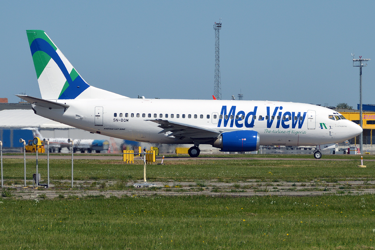 Med-View Airlines, 5N-BQM, Boeing 737-5Q8